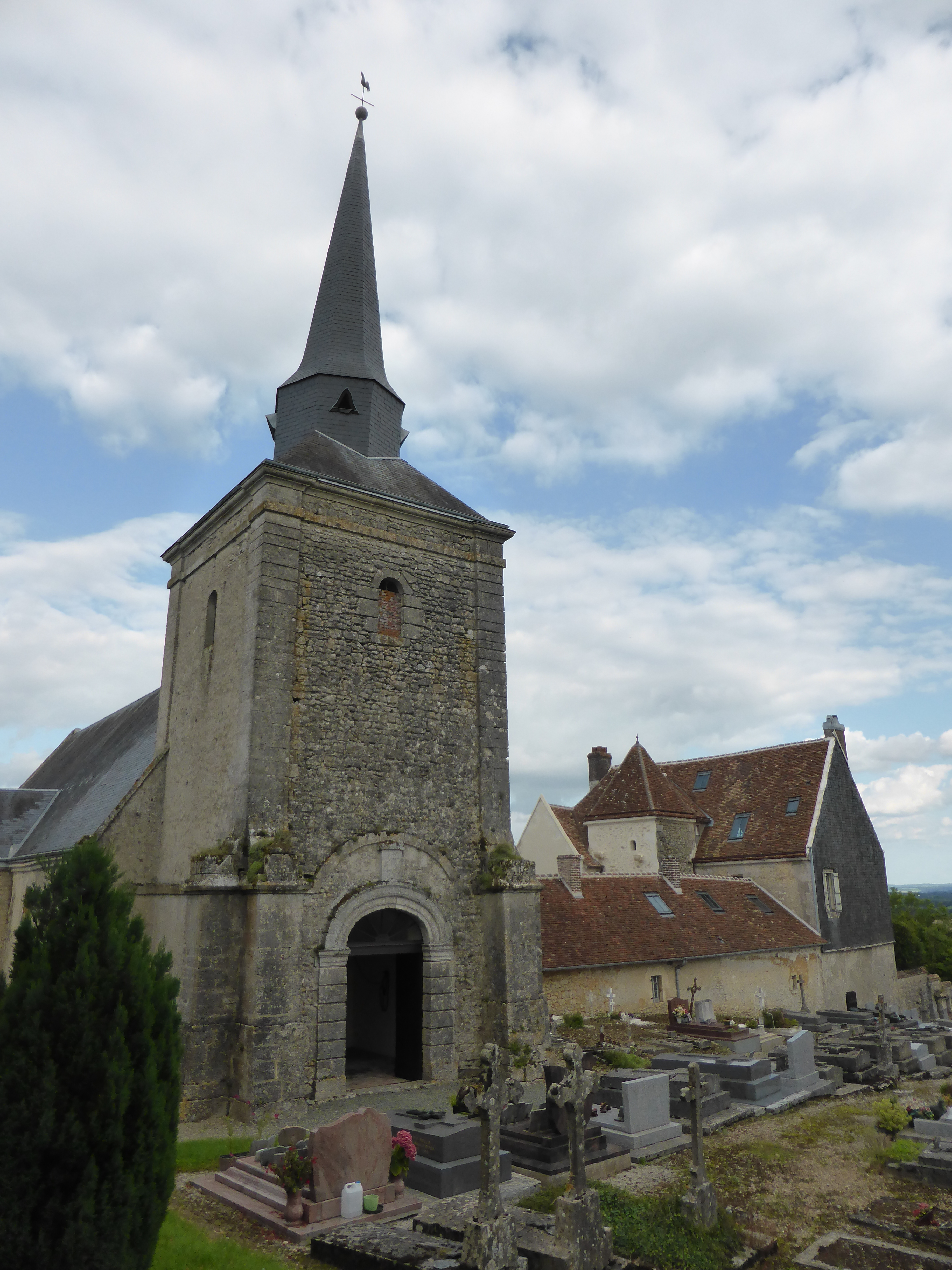 Église Saint-Rémi et presbytère de Sérigny, dans l'Orne, en France.